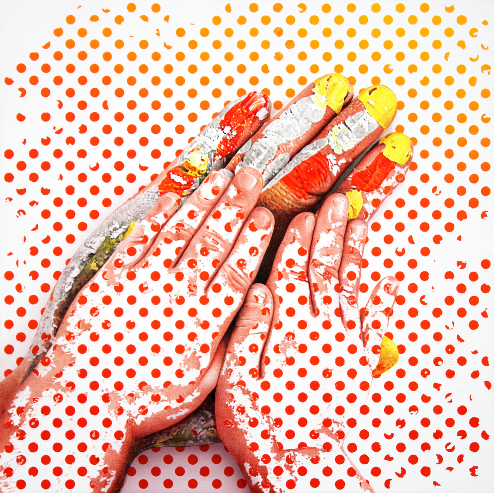 Acrílico sobre lienzo